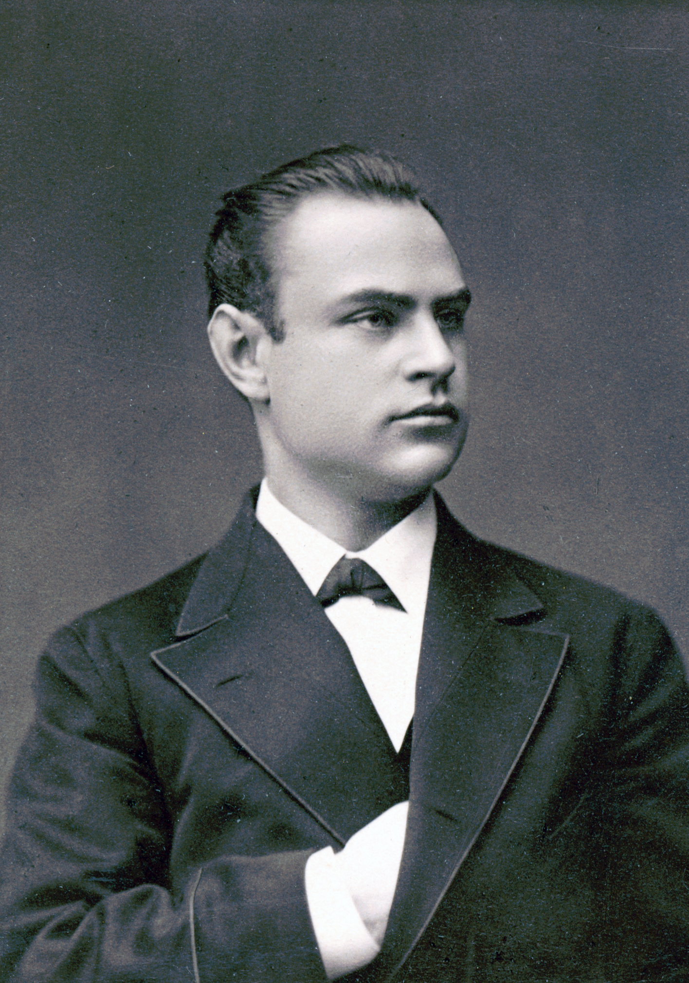 Oscar Sternvall, skådespelare vid Stora teatern i Göteborg 1886